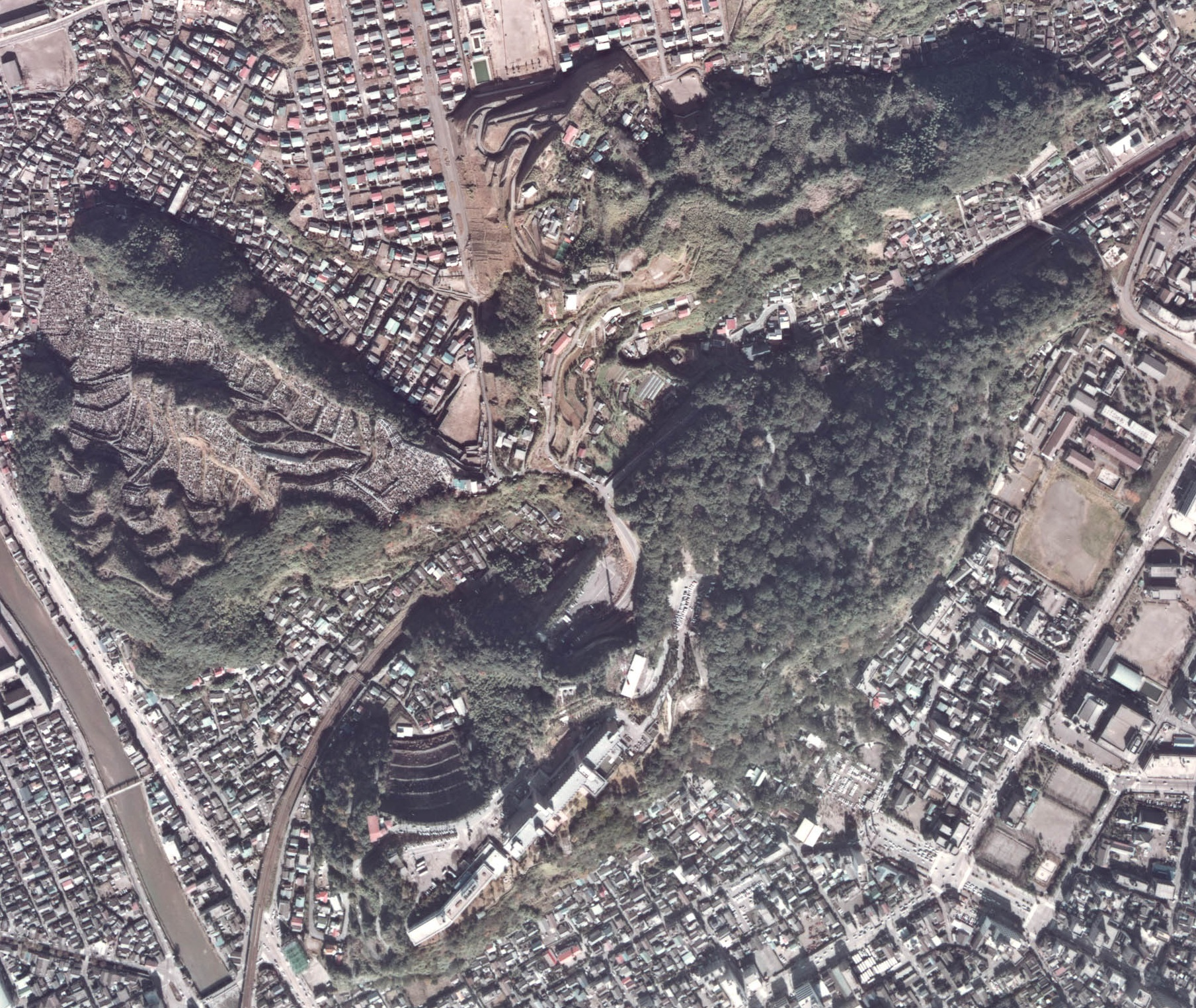 城山周辺の航空写真。